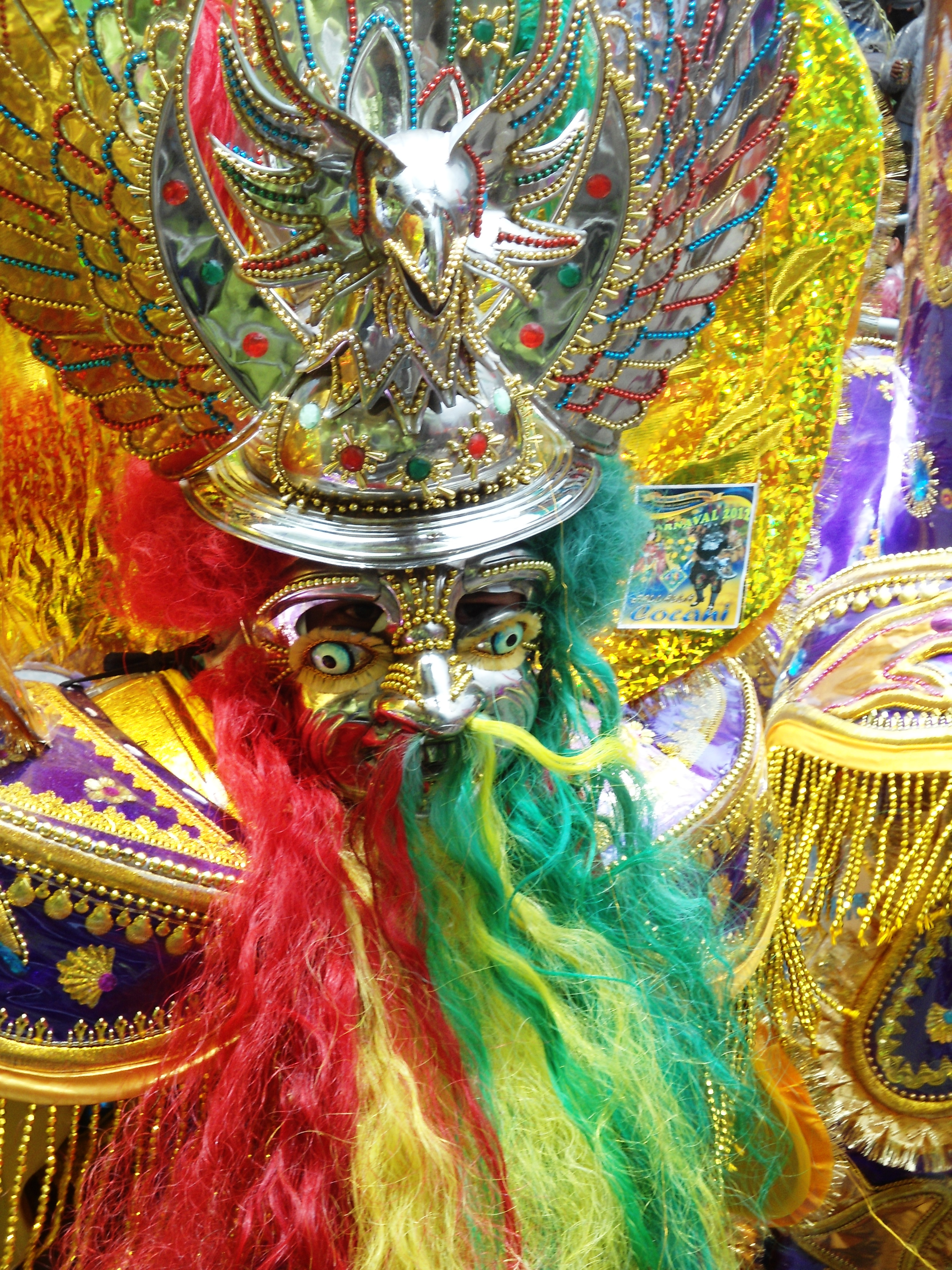 Mascara de la morenada. Carbaval de Oruro.